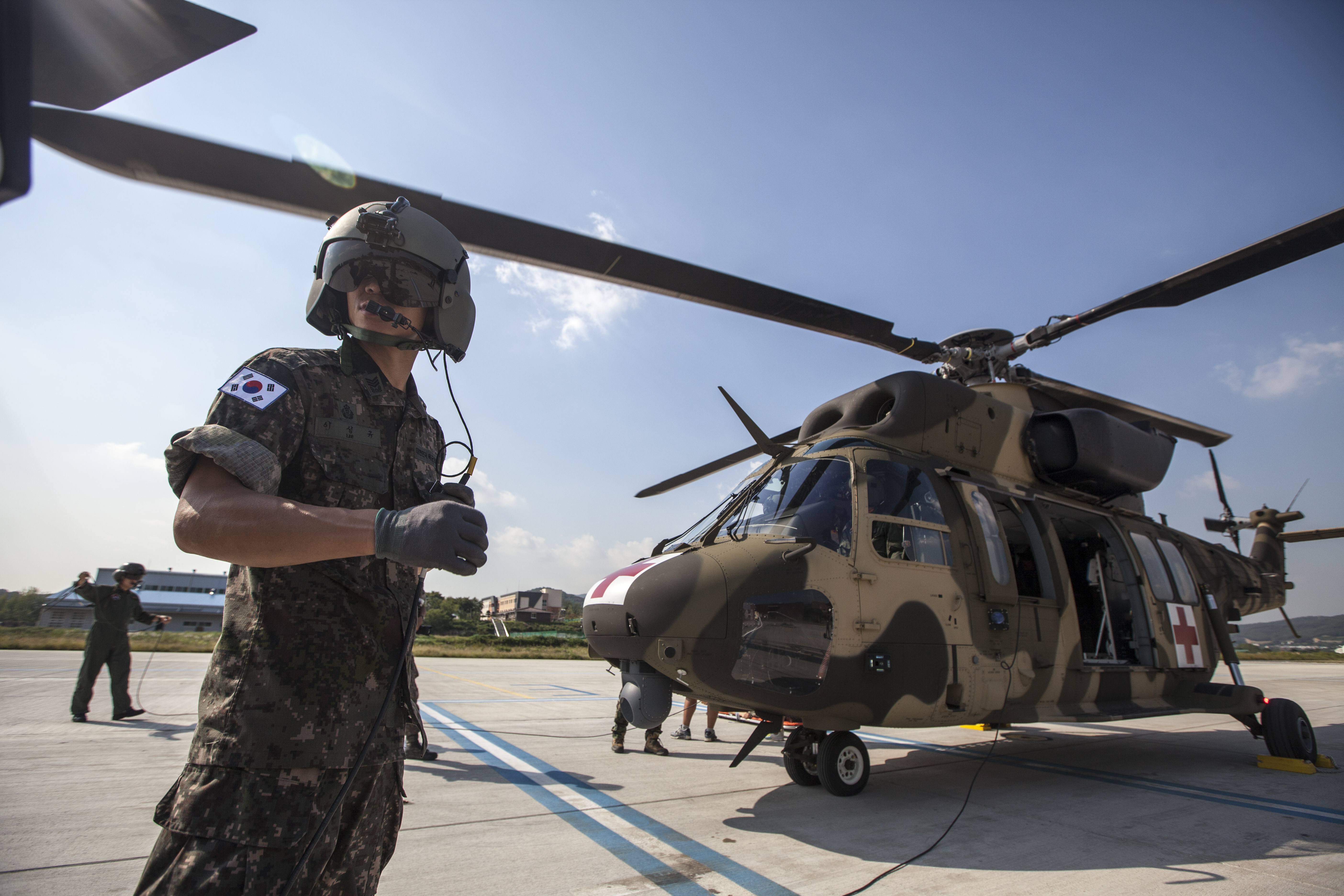 2015.9.22 육군 의무후송항공대 '메디온' 촬영 : 정승익